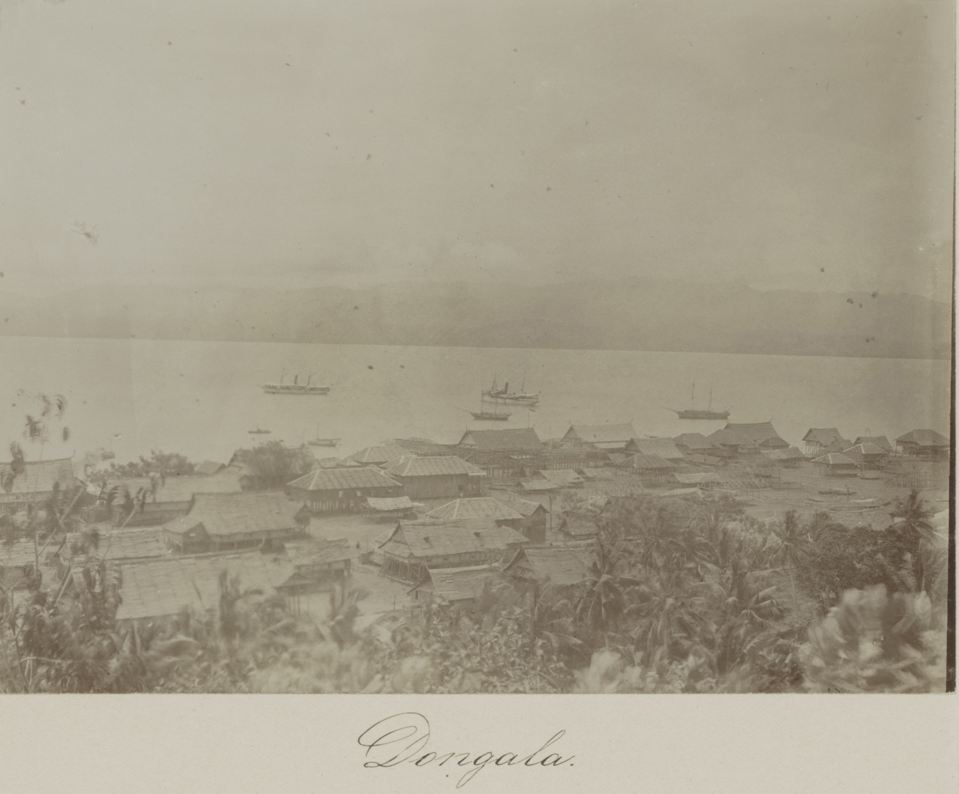 Academische Collecties: 1899-1900, Siboga-expeditie naar Nederlands Oost-Indië, onder leiding van Max Wilhelm Carl Weber Gezicht op Dongala, havenplaats aan de westkust van Celebes, gelegen aan de straat van Makassar; de Siboga ligt voor anker op de rede.